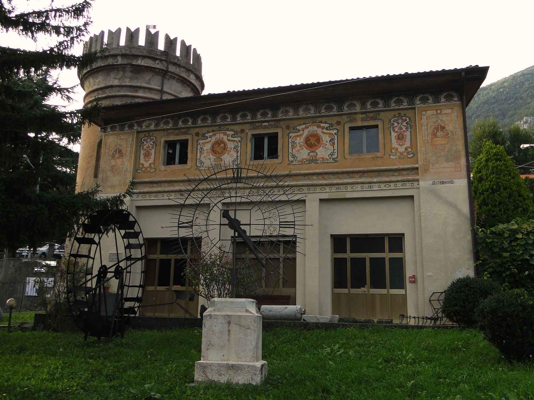 Comenduno, fraz. di Albino (BG), museo etnografico nella villa Regina Pacis